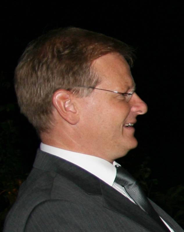 Prof. Arnd Stephan, TU Dresden (2009)